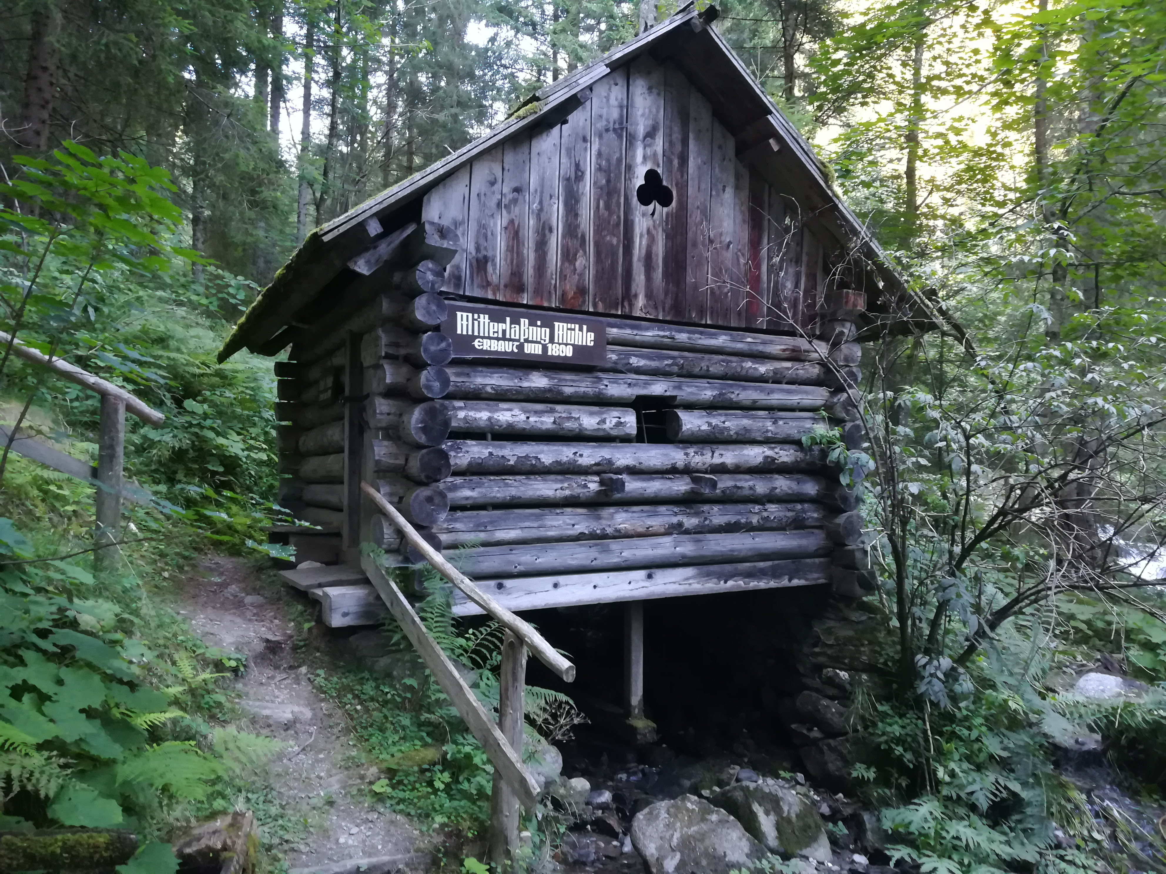 Mitterlaßnigmühle/Veidlmühle in Kaning bzw. am Kaninger Mühlenwanderweg. Um 1800 erbaut.